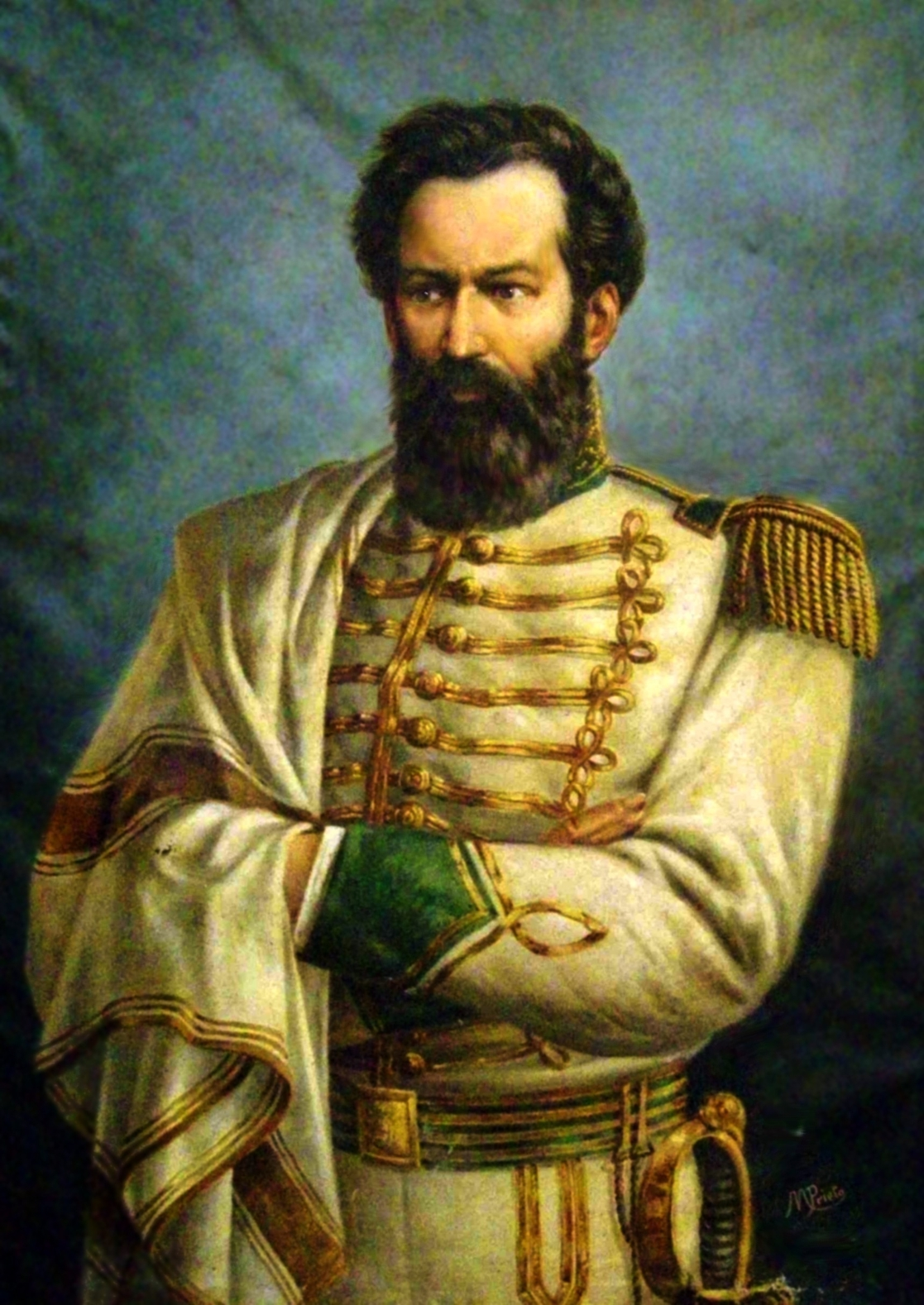 Retrato del militar y político argentino, Martín Miguel de Güemes